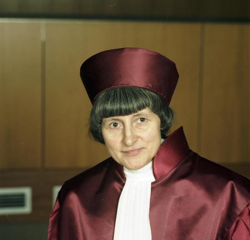 18.12.1989 Helga Seibert, Richterin am Bundesverfassungsgericht I. Senat